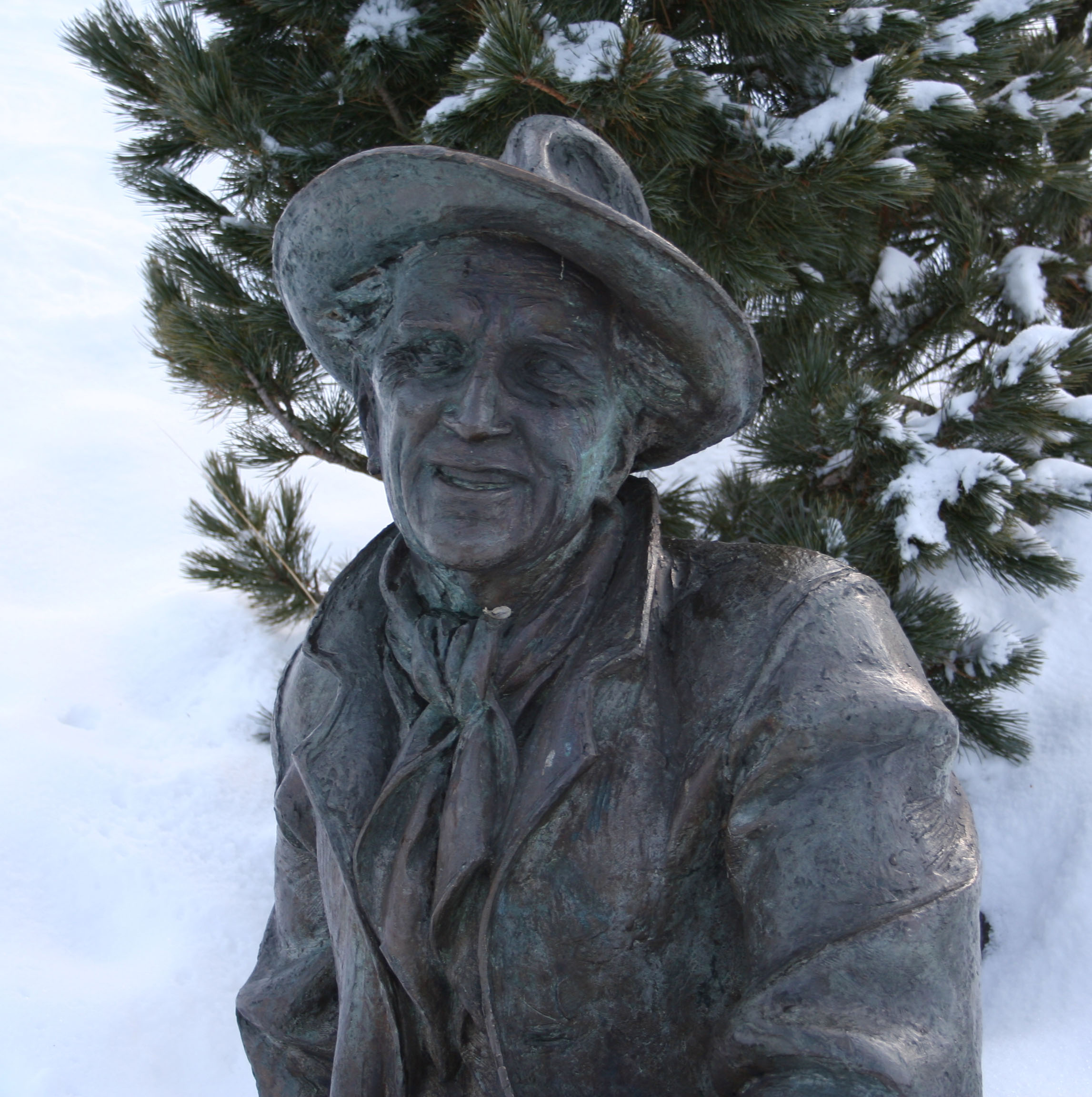 Luis Trenker Denkmal, Tirler - Seiser Alm